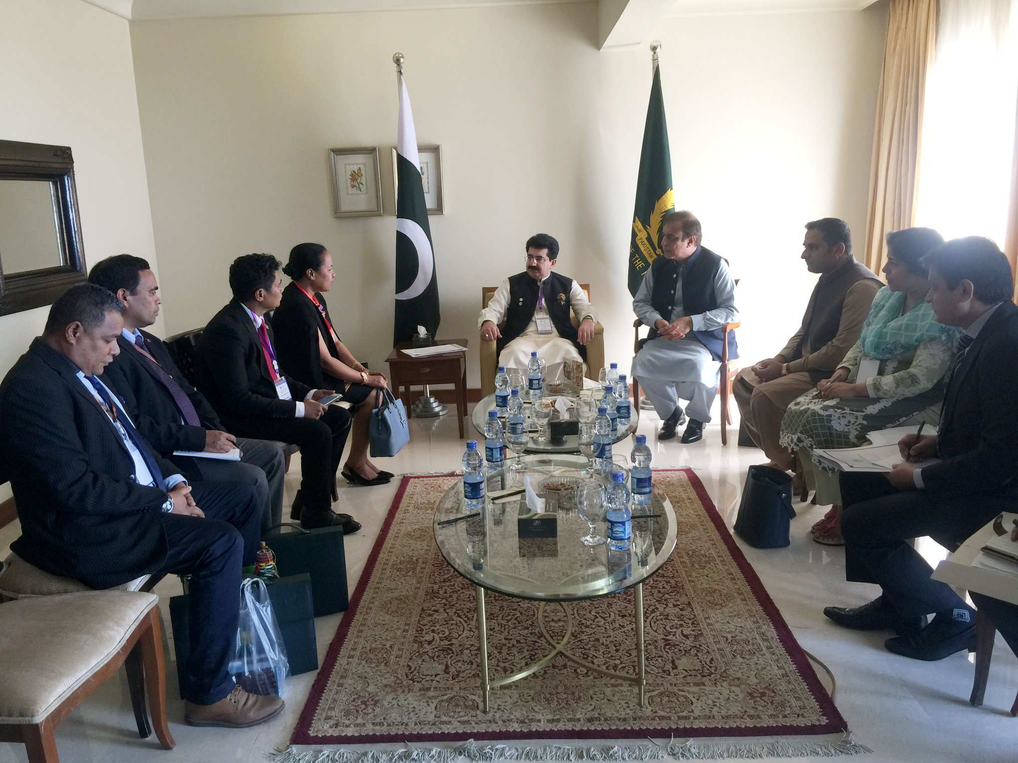 Osttimoresische Parlamentarier treffen bei der Versammlung des Asiatischen Parlaments (APA) in Gwadar (Pakistan) Senatspräsident Sadiq Sanjrani